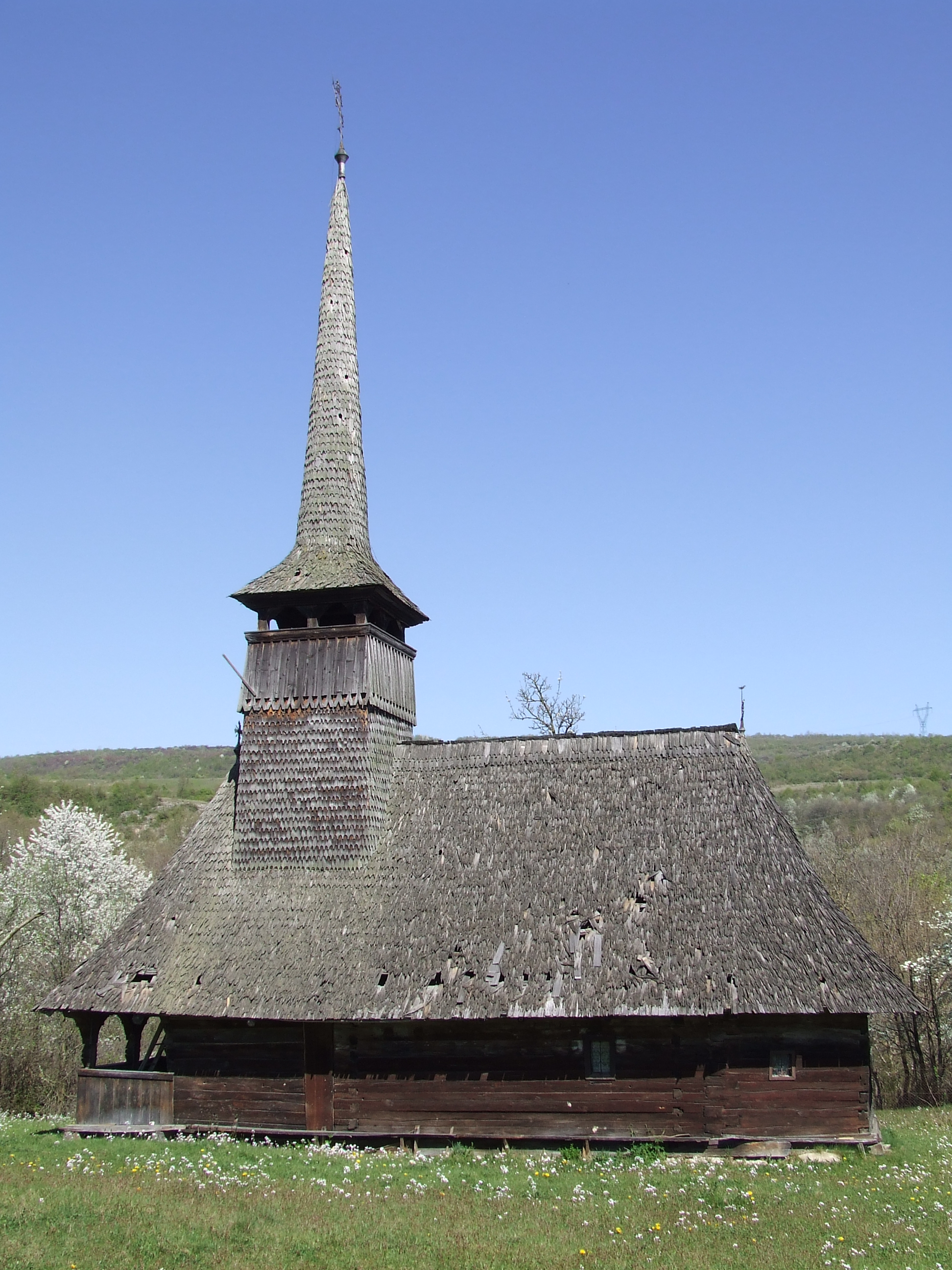 Szent Mihály és Gábriel arkangyalok ortodox fatemplom, Építése: 16. század. (Szamoshéviz)